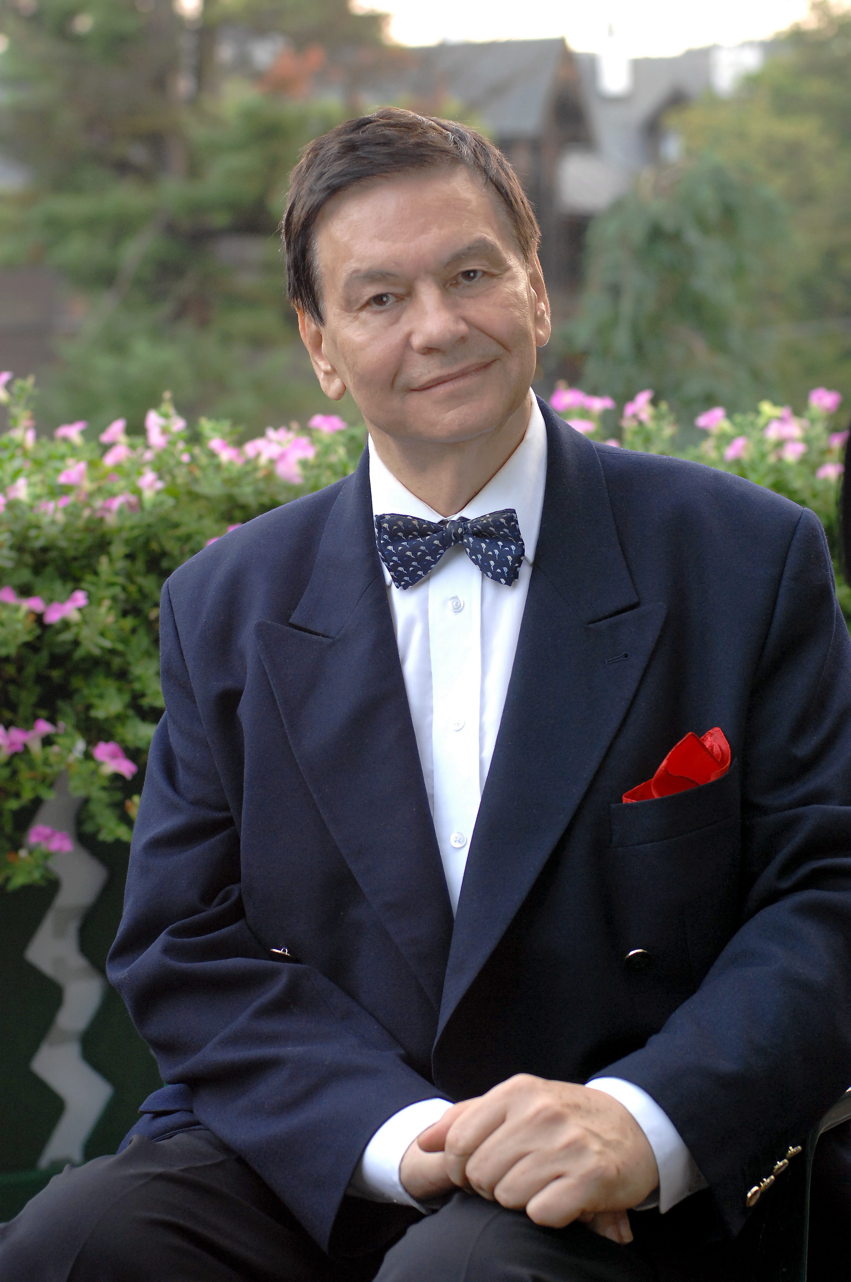 Bogusław Kaczyński, dziennikarz, publicysta i krytyk muzyczny, popularyzator opery, operetki i muzyki poważnej, teoretyk muzyki, twórca telewizyjny, animator kultury, prezenter i autor wielu programów w TVP.